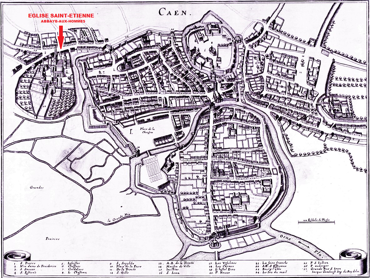 Abbaye aux Homme, l'église Saint-Etienne sur le plan de 1657 (image du domaine public modifiée)